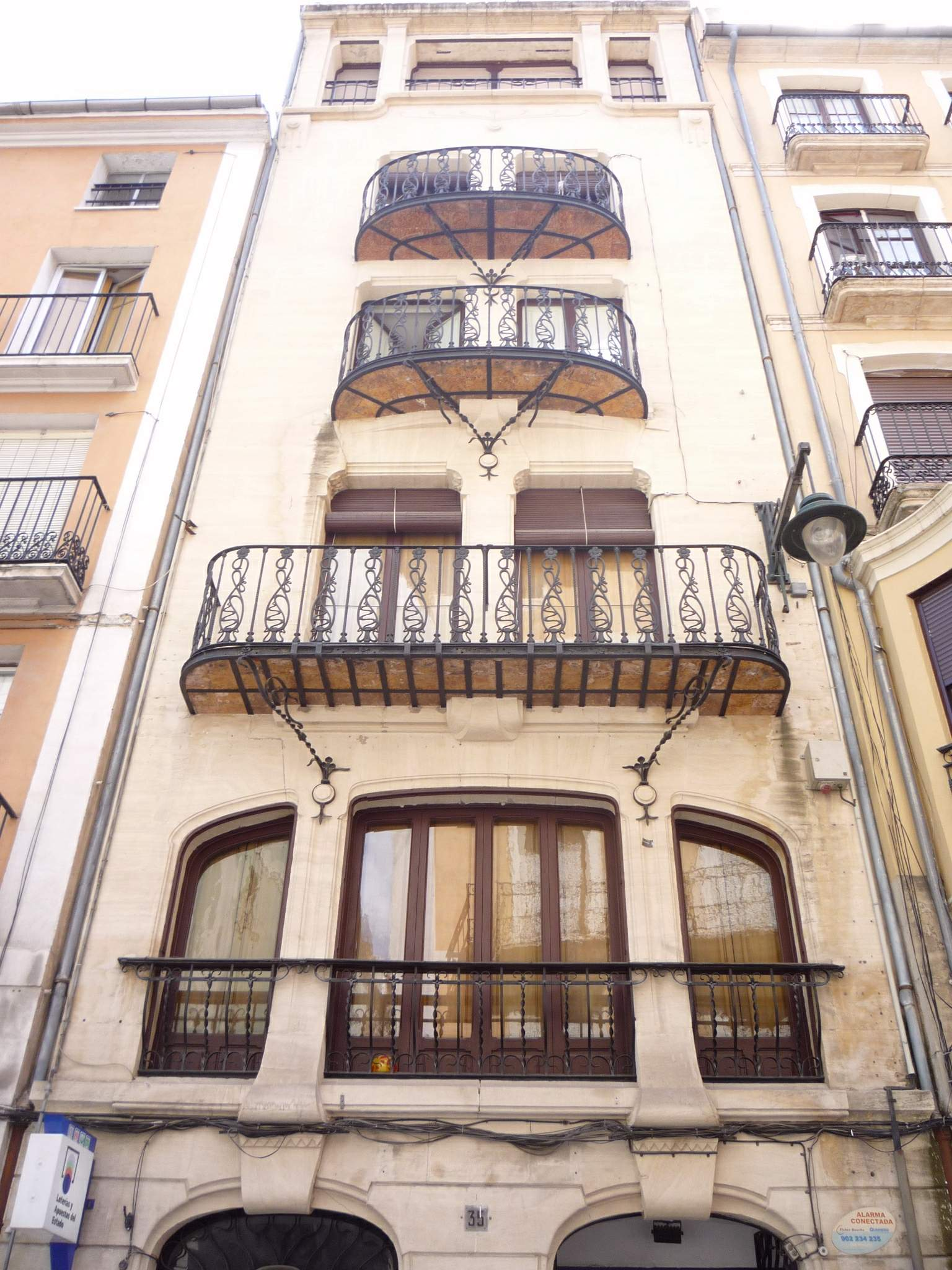 Alcoy - Edificio modernista en Calle Sant Nicolau, 35